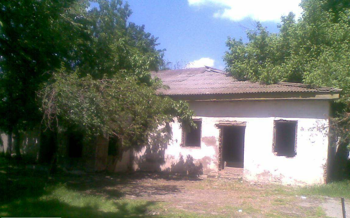 Köhnə hamam.1900-cu il.